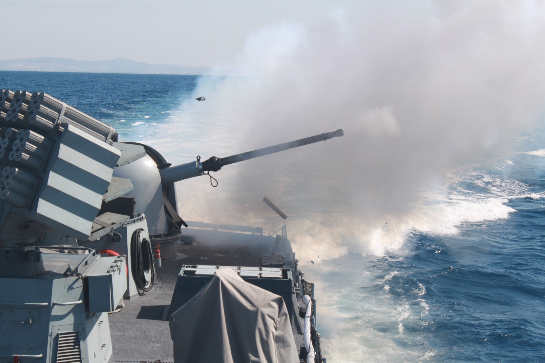 תותח אוטו מלרה 76 מ"מ של אח"י חרב (סער 4.5) יורה